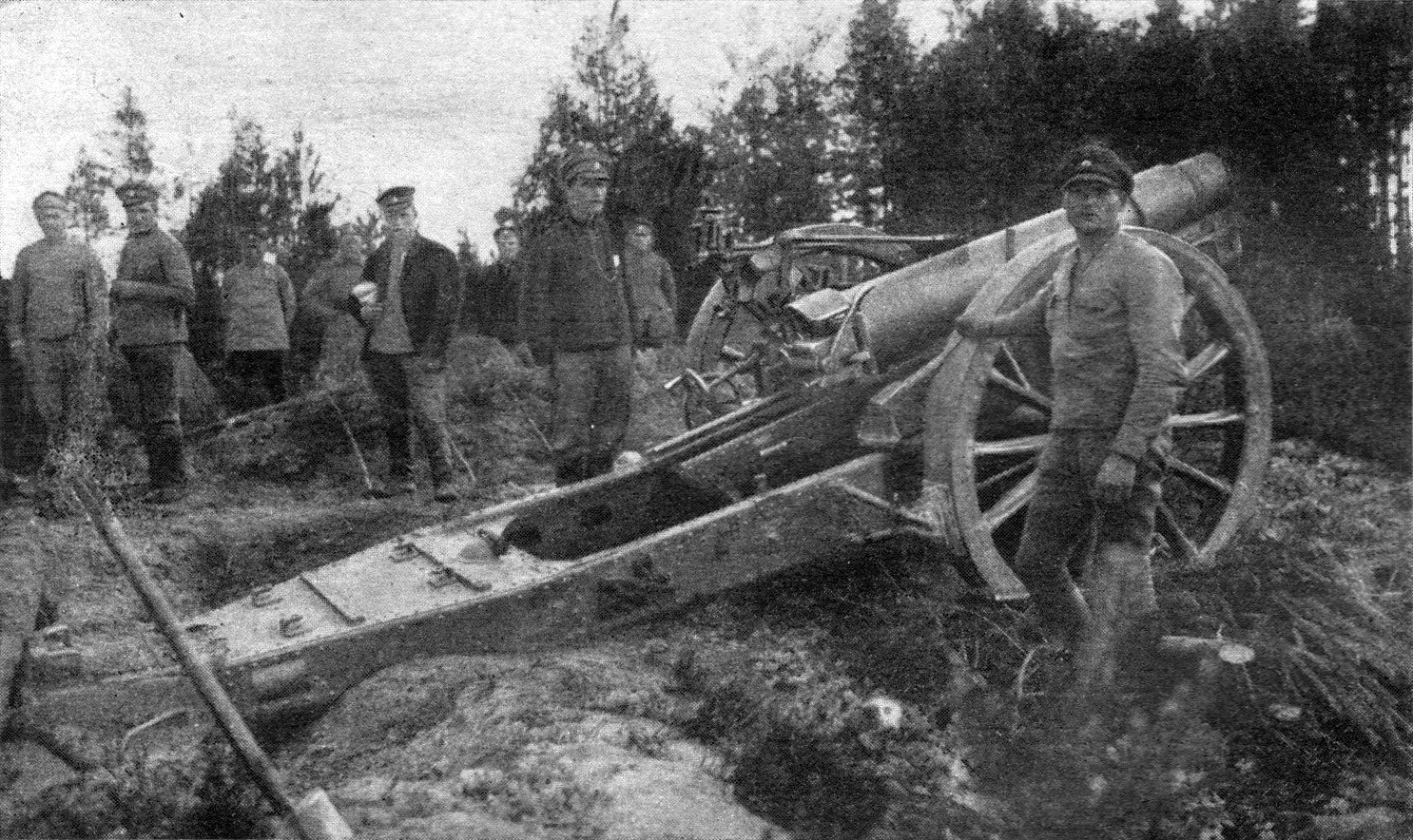 Välipatarei nr. 14 (Kuperjanovi partisanide patarei) tulistab vaenlast.